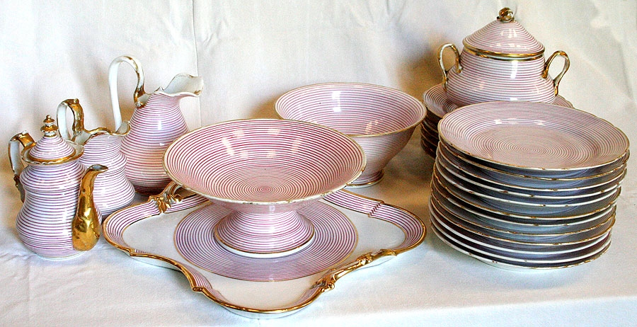 Service de table en porcelaine de Valentine, France, fin XIXe siècle.